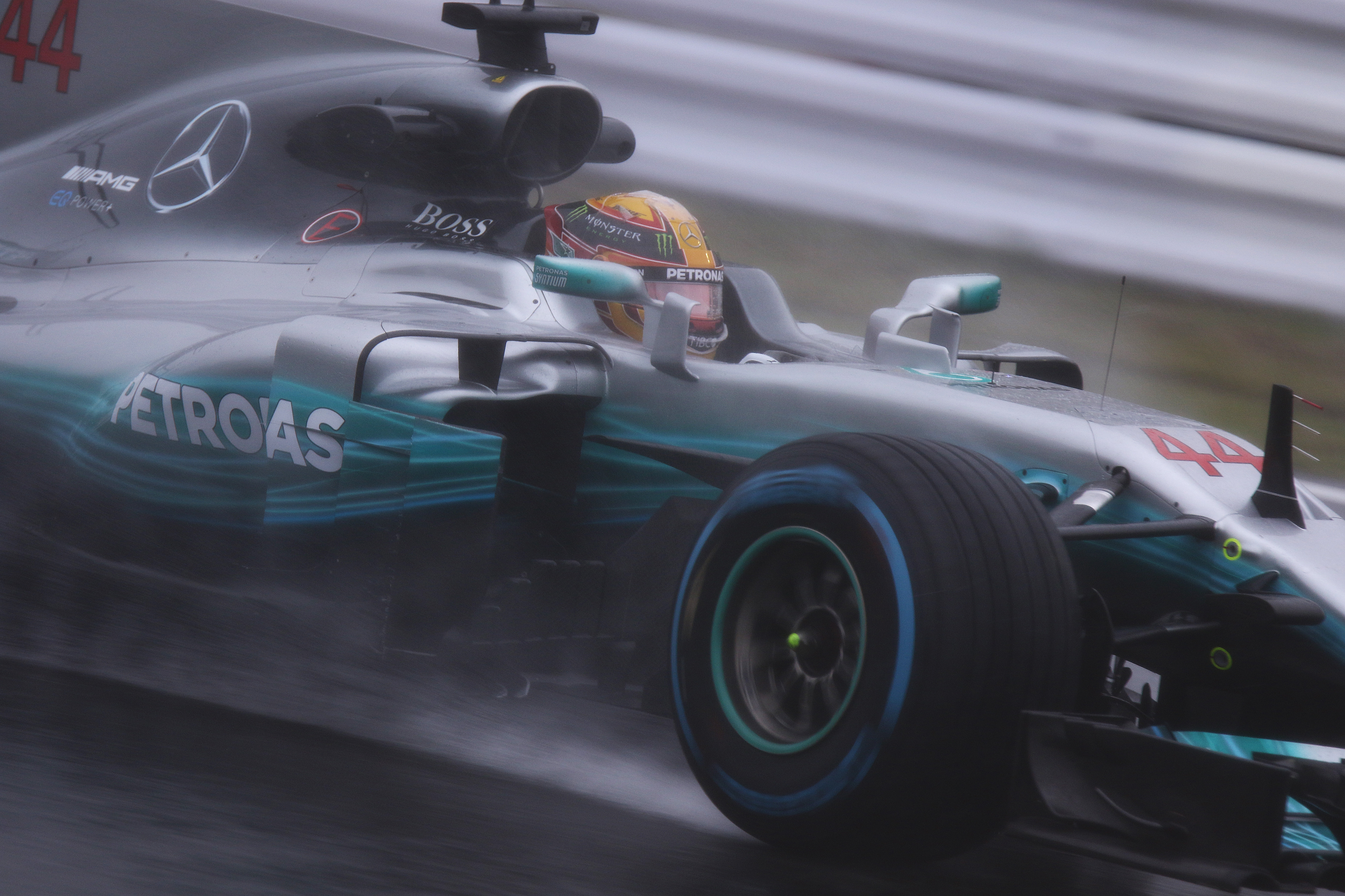 2017.10.6 F1 Rd.16 Japanese GP SUZUKA (FP2) Mercedes AMG Petronas F1 Team (W08) 44 ルイス・ハミルトン [7D2_1314ks]